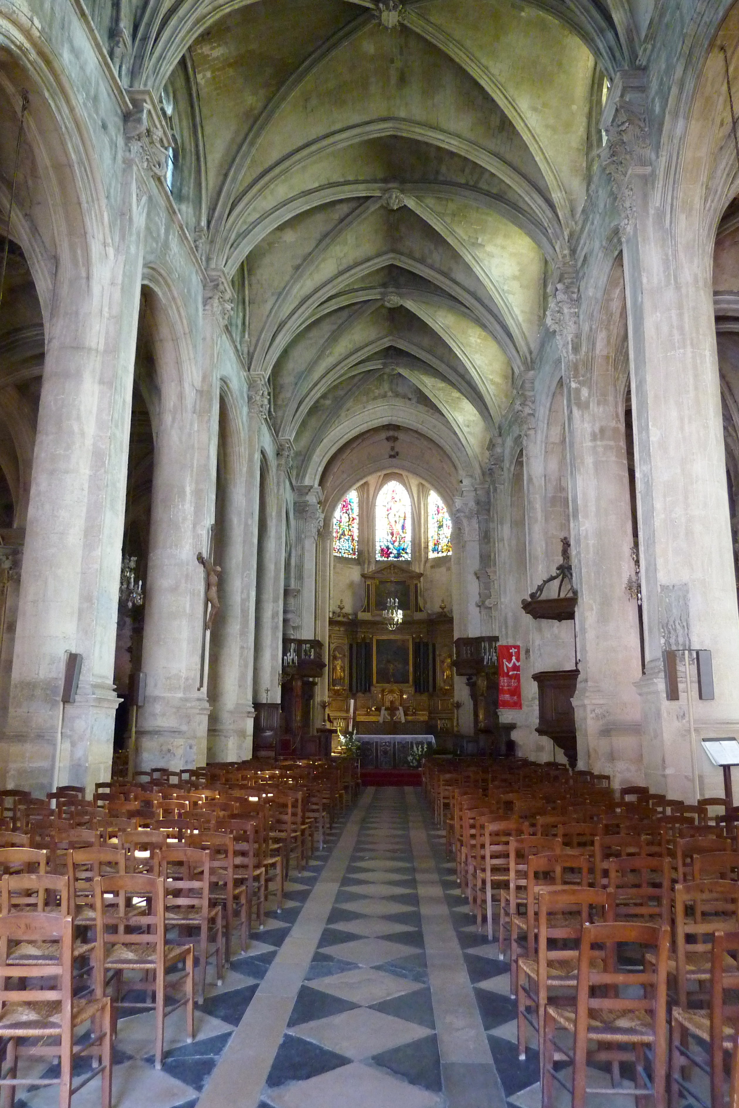 Kathedrale Saint-Maclou in Pontoise